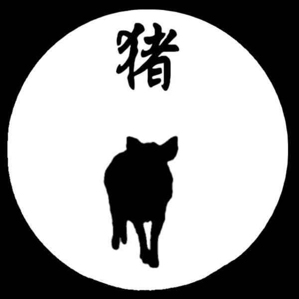 Porc-Sanglier-Cochon